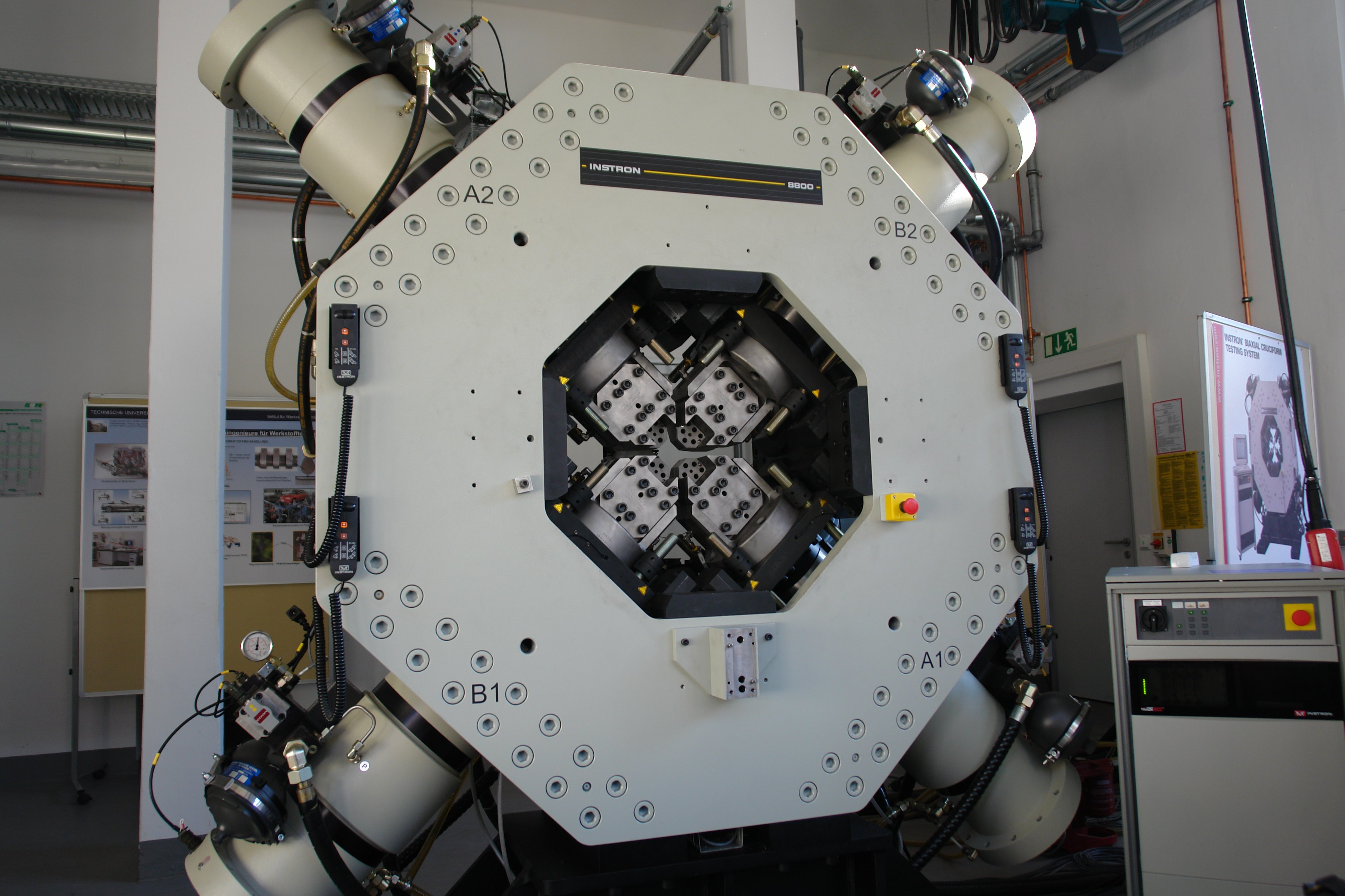 biaxiale Materialprüfmaschine mit vier Zylindern die Probe im Kreuzungspunkt ist im Moment nicht eingespannt